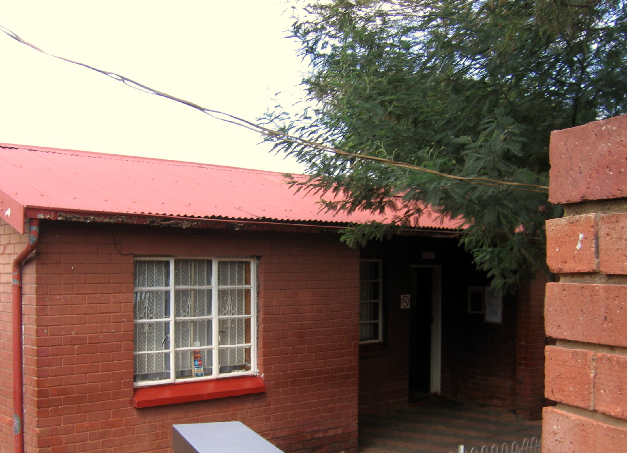 Mandela_House rue Vilakazi à Soweto Afrique du Sud